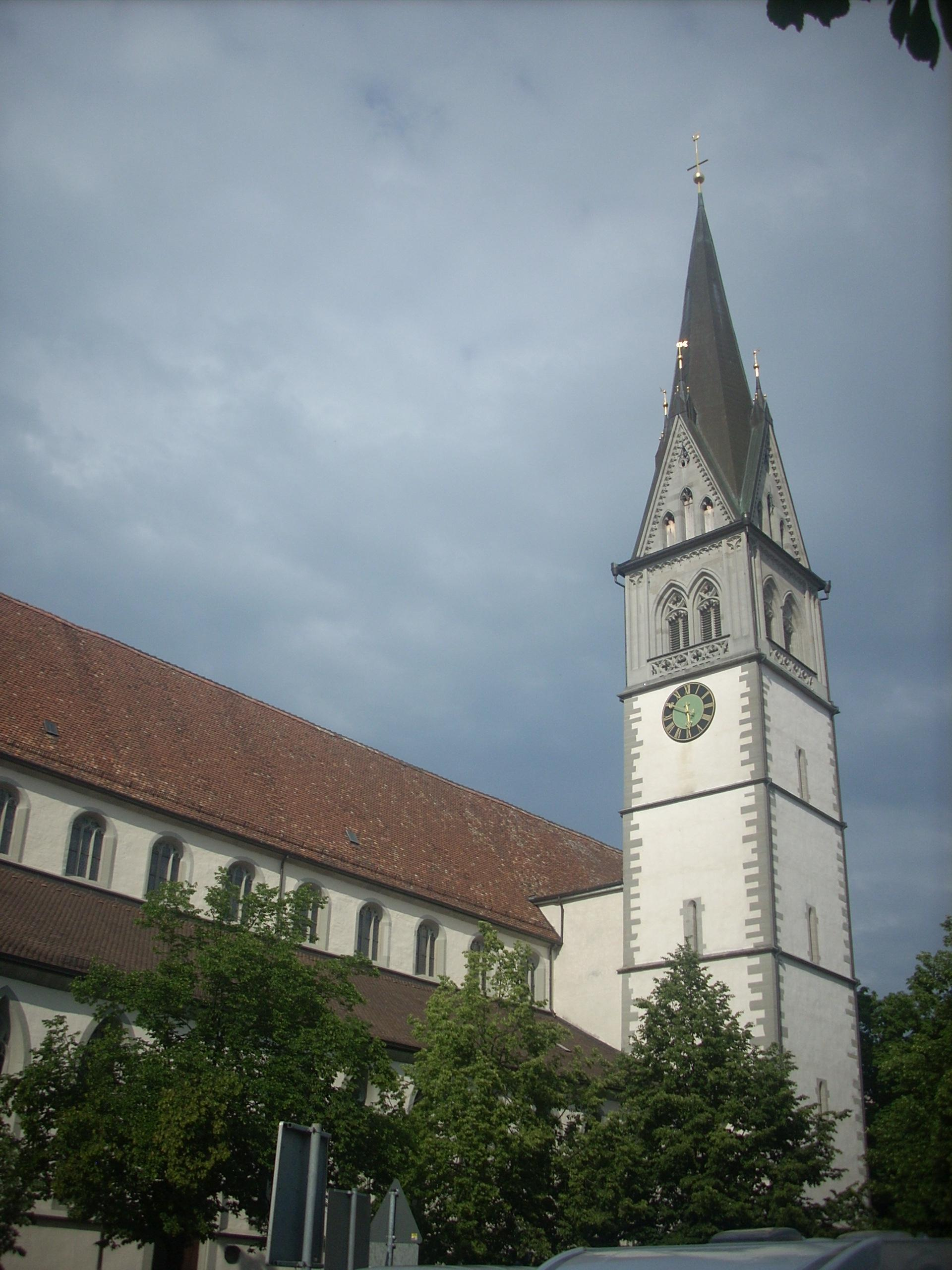 Konstanz, St. Stephan von SW